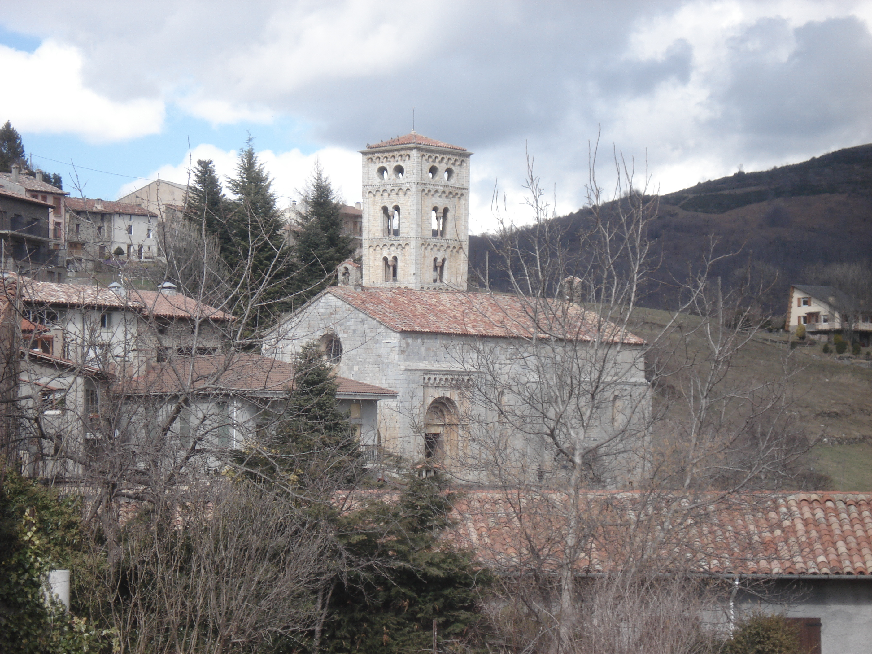 Església de Santa Cecília de Molló (Ripollès, Catalunya).